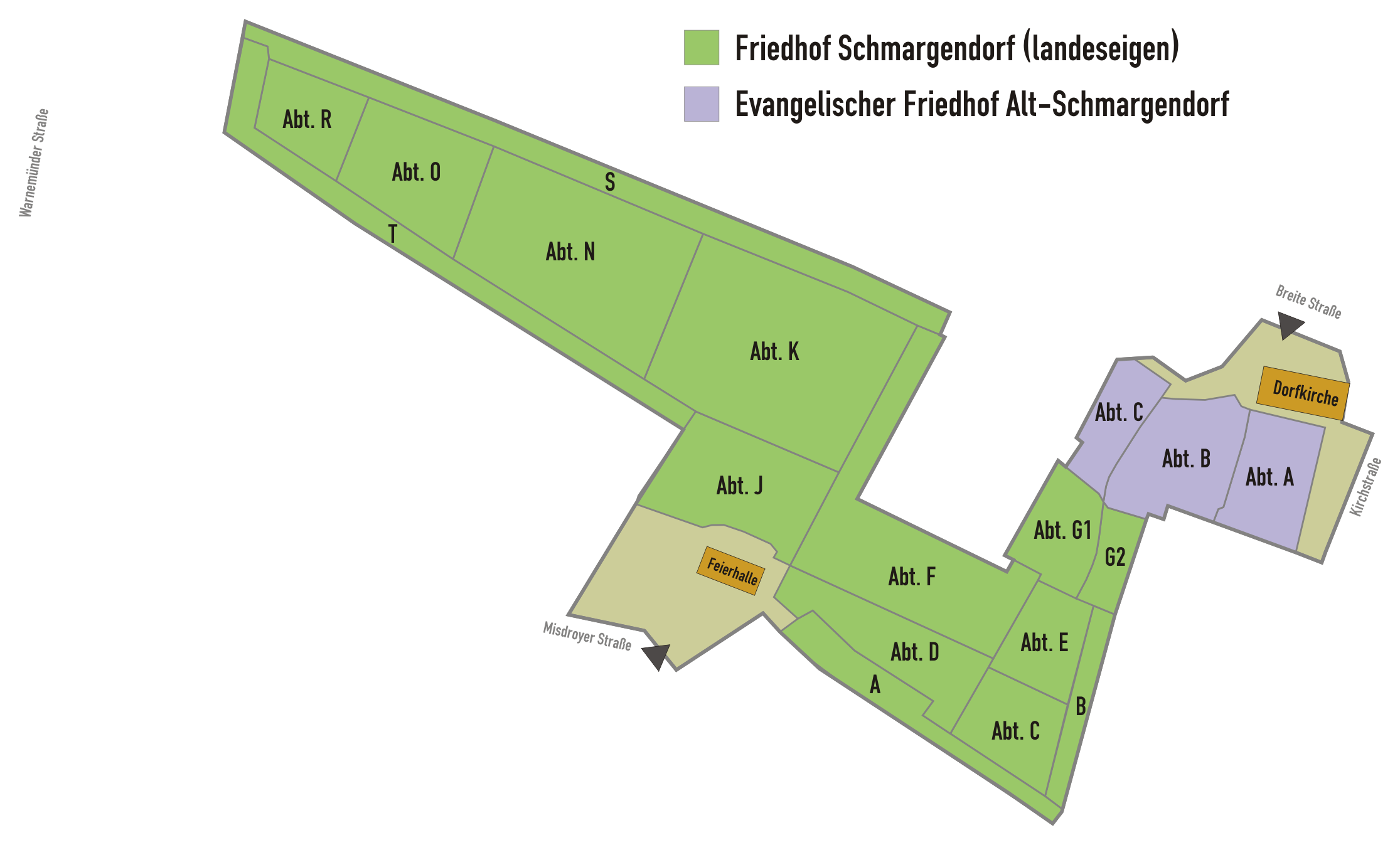 Friedhof Schmargendorf in Berlin in der Ausdehnung von 1914. Die Einteilung der Abteilung entspricht dem Zustand 2009. Belegt durch den "Übersichtsplan von dem Bebauungsplan der Gemarkung Berlin-Schmargendorf / Angefertigt im Mai 1914". Abgedruckt in: Udo Christoffel: Berlin-Wilmersdorf dargestellt im Kartenbild der Jahre von 1588 bis 1938